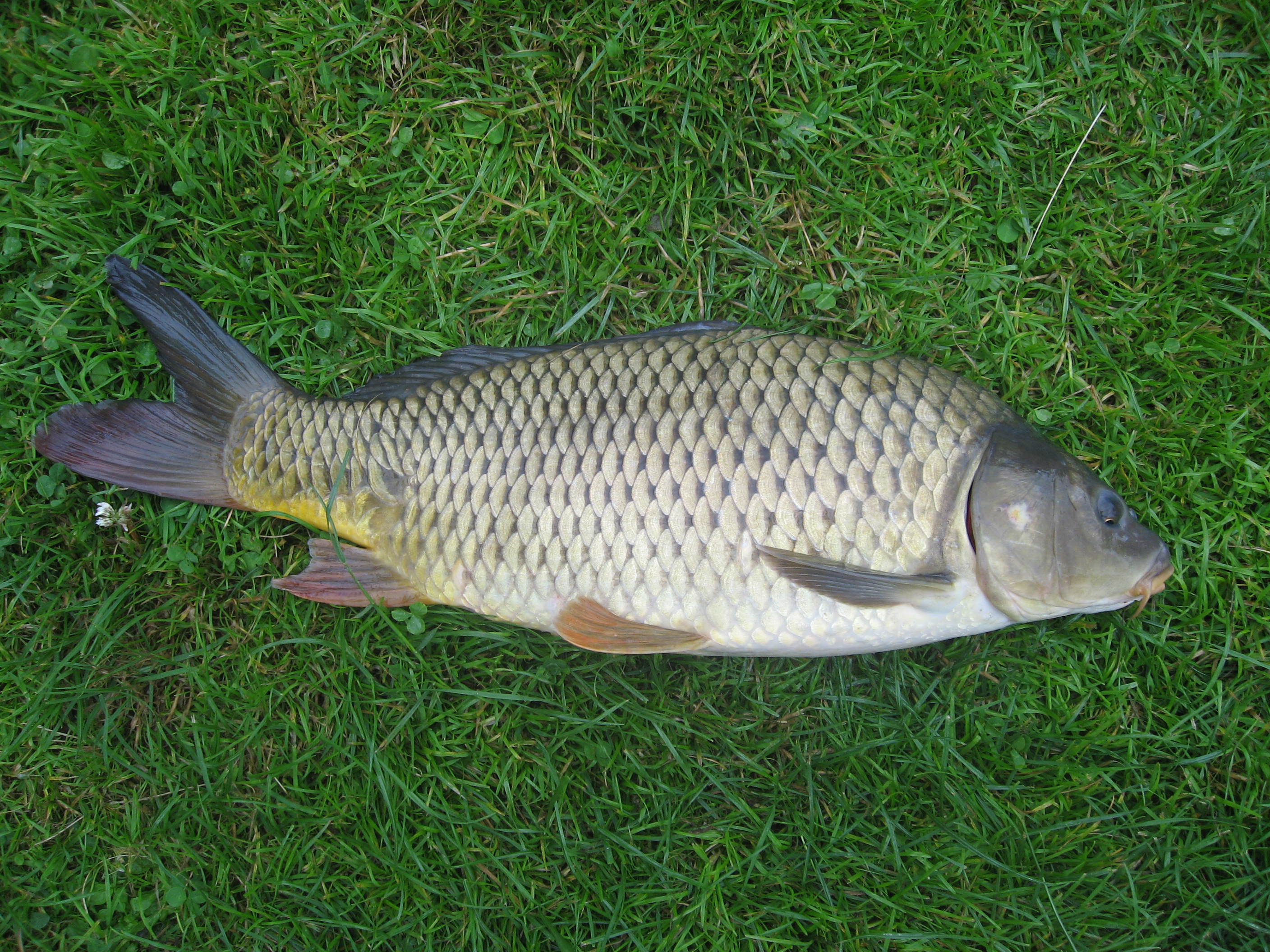 Kapr obecný